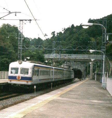 現役当時のja:南海21000系電車 新塗色（おそらく天見にて）